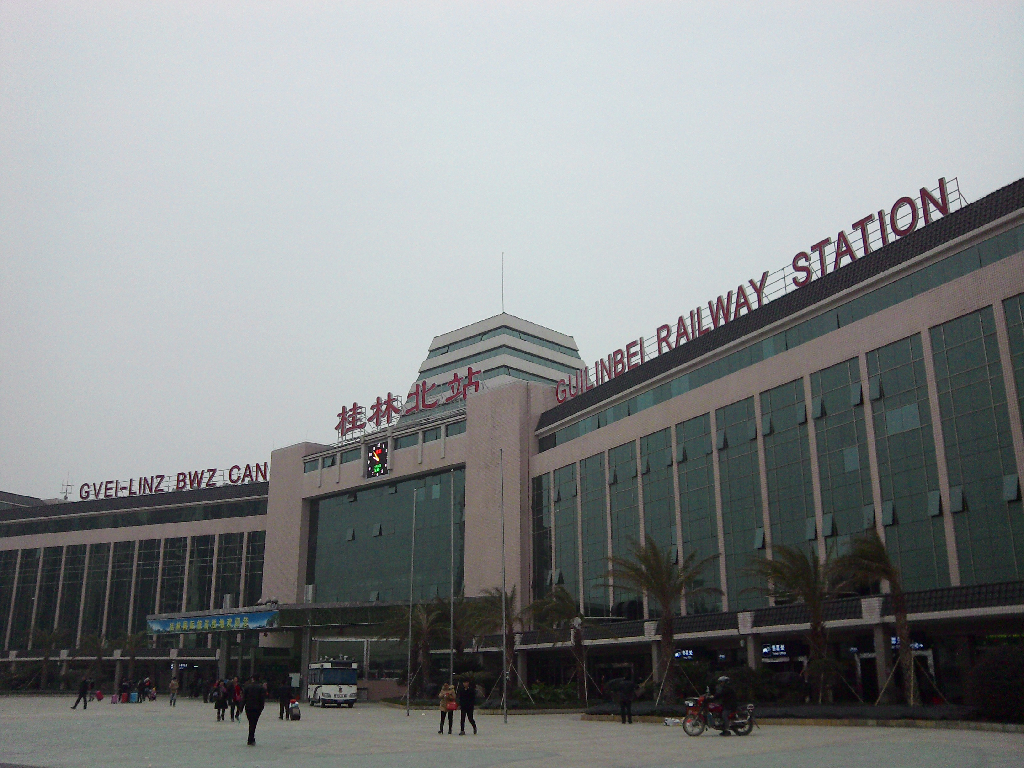 桂林北站Vahcuengh: Gvei-linz Bwz Can